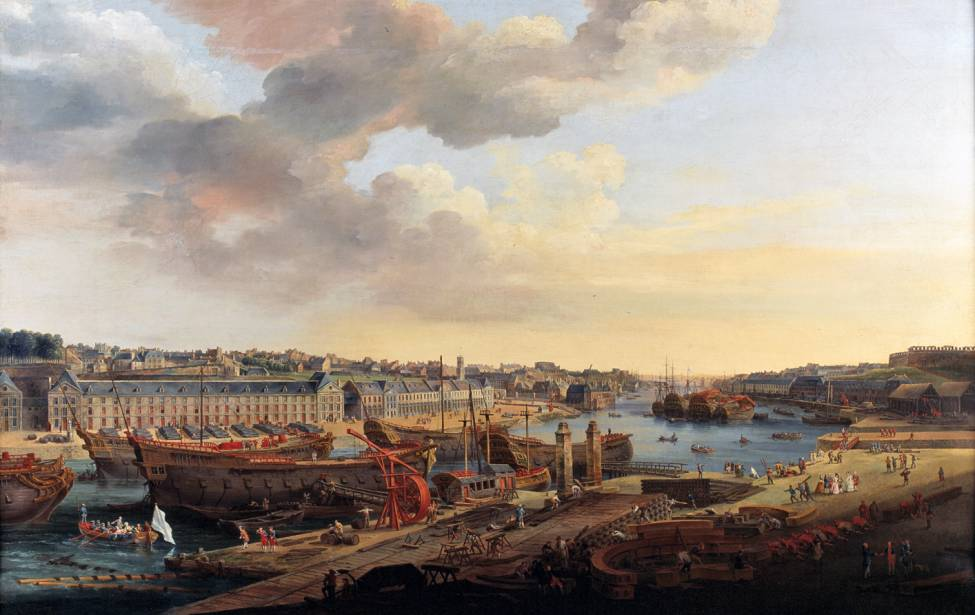 Vue du port de Brest réalisée en 1774. Début du règne de Louis XVI. Huile sur toile, 125 X 194,5 cm. Musée des Beaux-Arts de Brest Métropole Océane.